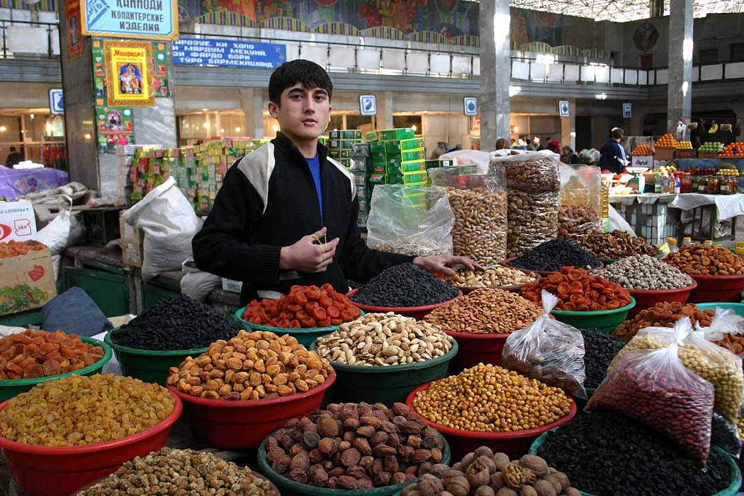 A boy selling dry fruit at a market in Tajikistan in 2005.